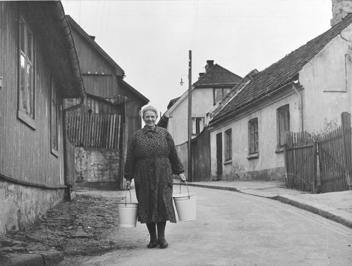 Vannbæring i Flisberget, ca. 1950. Foto: Aage Storløkken/Oslo Museum.